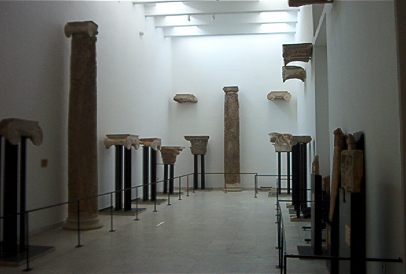 Fragments architectoniques de la fouille de Mahdia, Musée national du Nardo, Tunisie